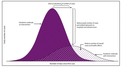 En esta gráfica se visualiza la idea de disminuir la propagación o aplanar la curva de una pandemia. La curva púrpura oscura muestra una enfermedad que se está extendiendo rápidamente, mientras que la curva rayada muestra una propagación lenta.